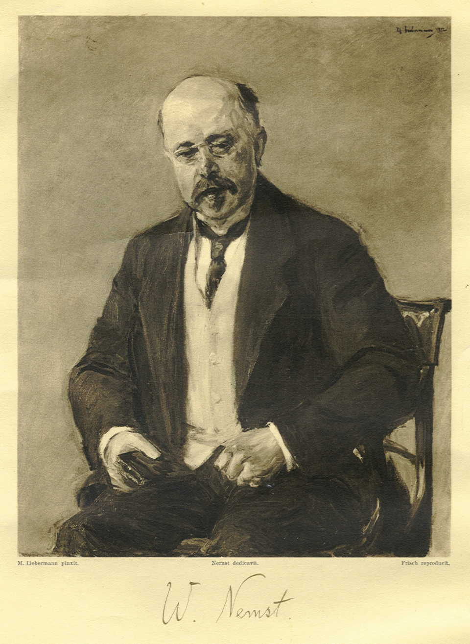 Walther Nernst (* 25. Juni 1864 in Briesen (Westpreußen); † 18. November 1941 in Zibelle (Oberlausitz), Painting by Max Liebermann (reproduction by Frisch), signed by W. Nernst. - Original Eigentum der Familie Nernst, verschollen auf dem Klostergut Hedersleben im Zuge der sowjet. Bodenreform 1945